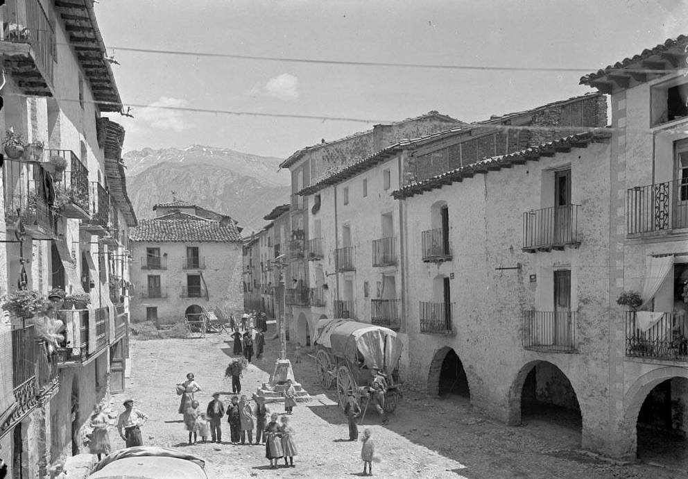 Imatge